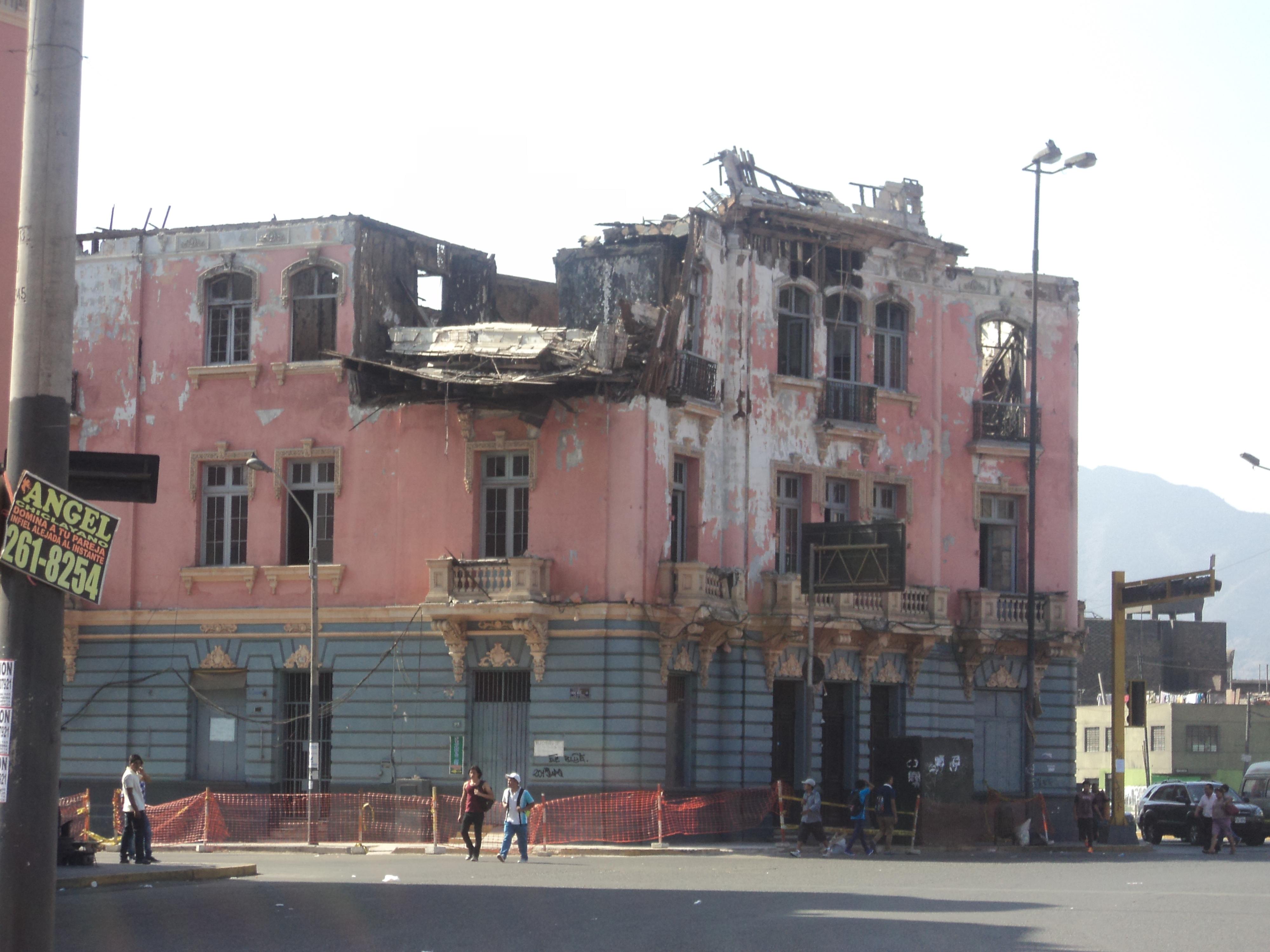 Uno de los 8 edificios circundantes de la Plaza Dos de Mayo siniestrado en 2014